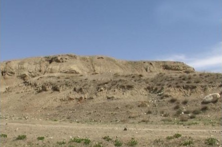 Girdesere salmas Muganciq